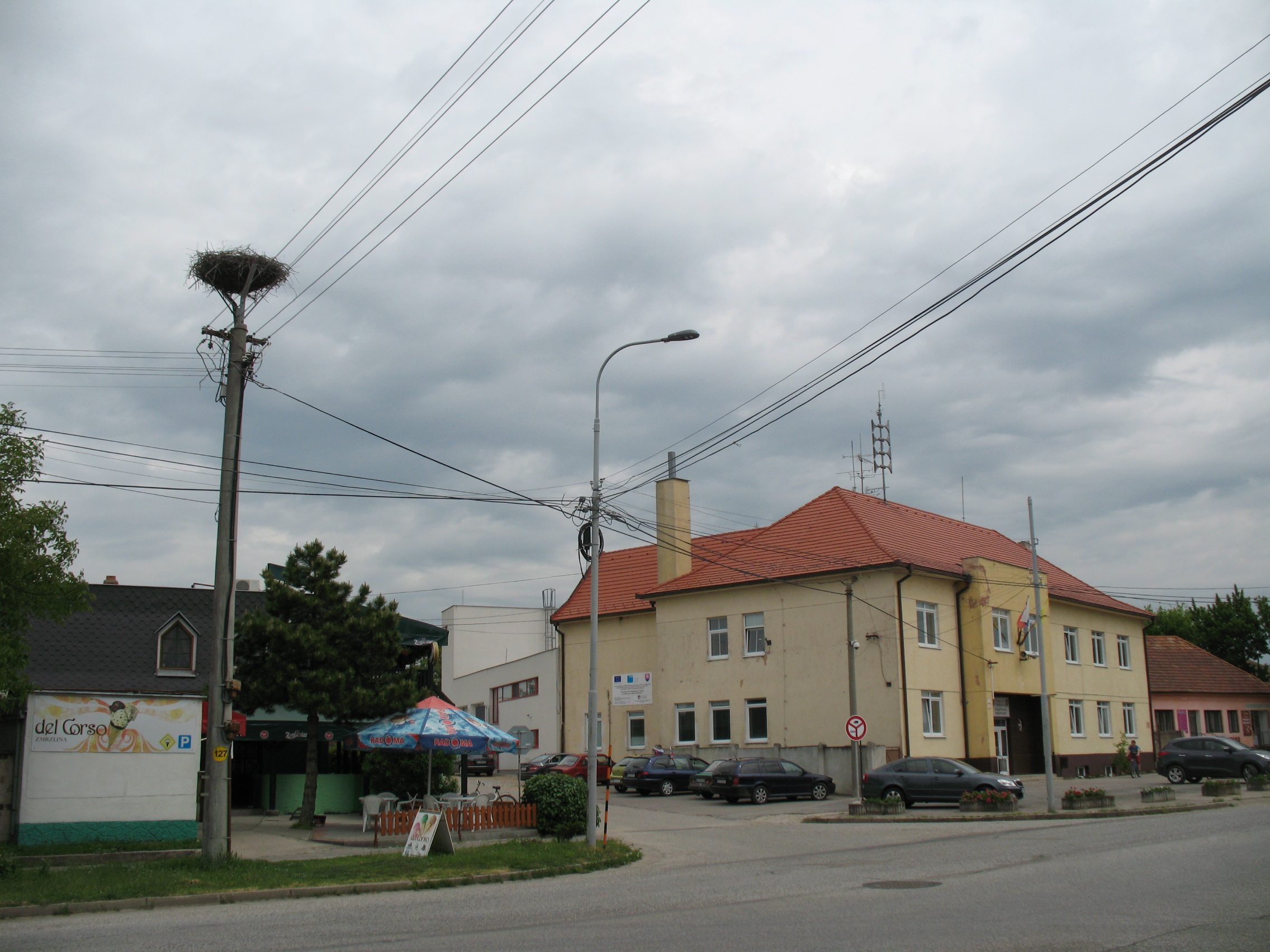 Tardoskedd